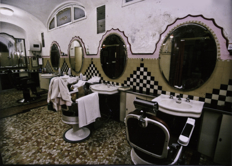 Barbiere e parrucchiere per uomo e donna - Albergo diurno di Porta Venezia, Milano